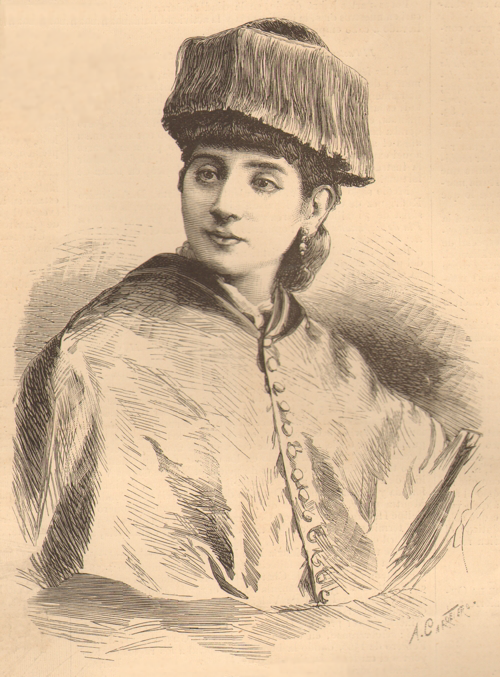 Martina Castells Ballespí (1852 - 1884) médico española, primera mujer doctorada en medicina en España en 1882. Grabado de Arturo Carretero y Sánchez.